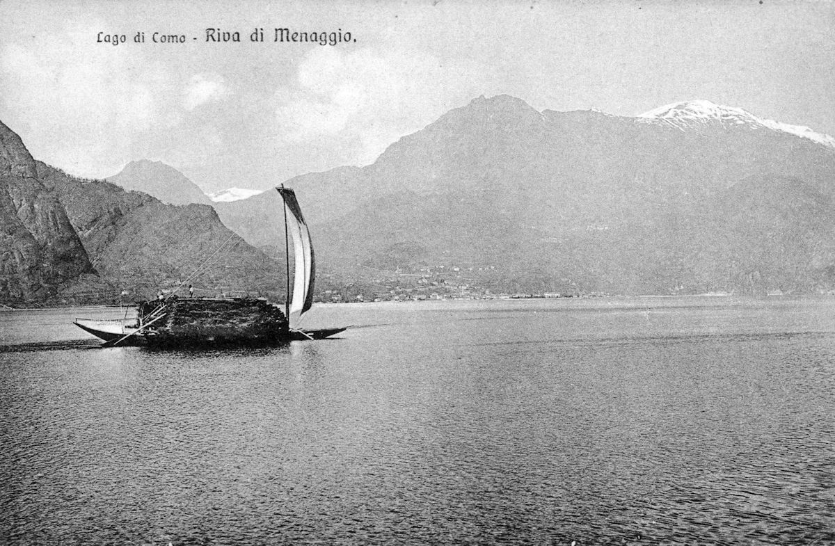 Comballo